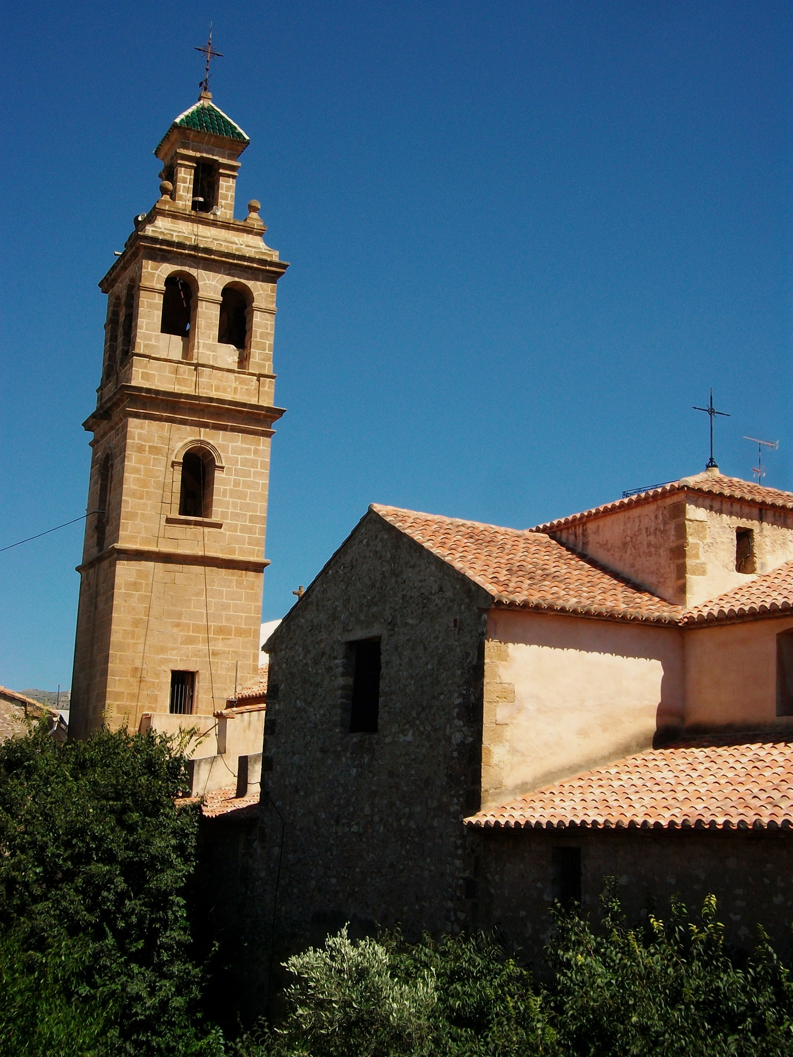 Campanar de l'església de Gata de Gorgos vist des de darrere.